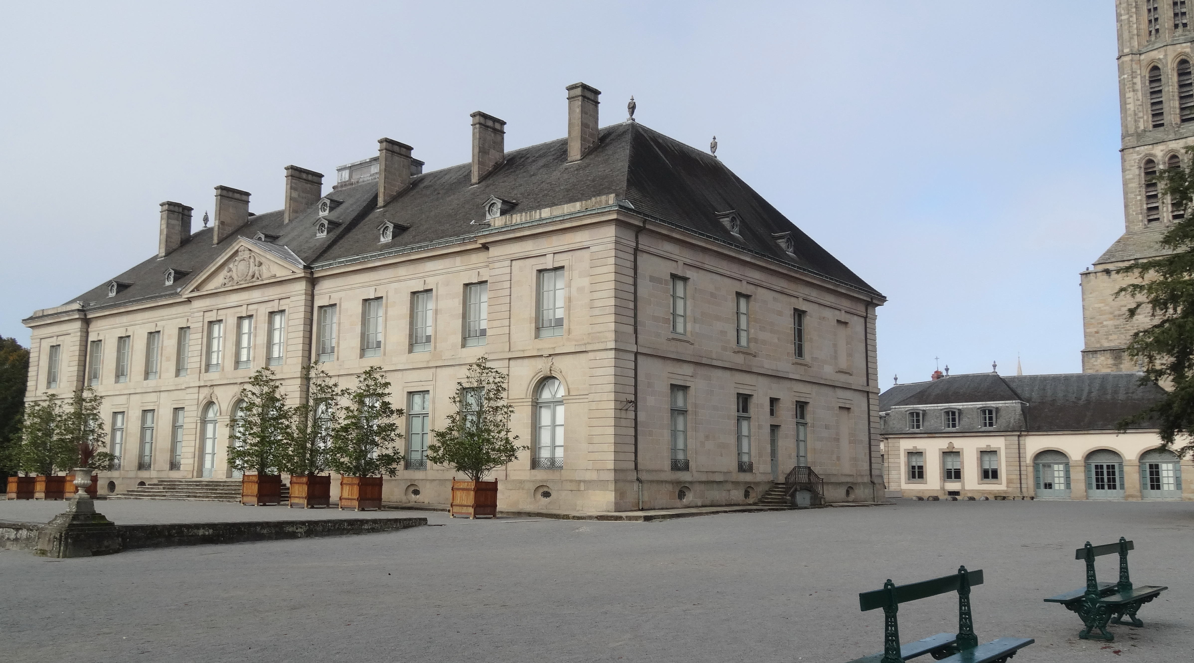 Musée de l’Évêché - Limoges